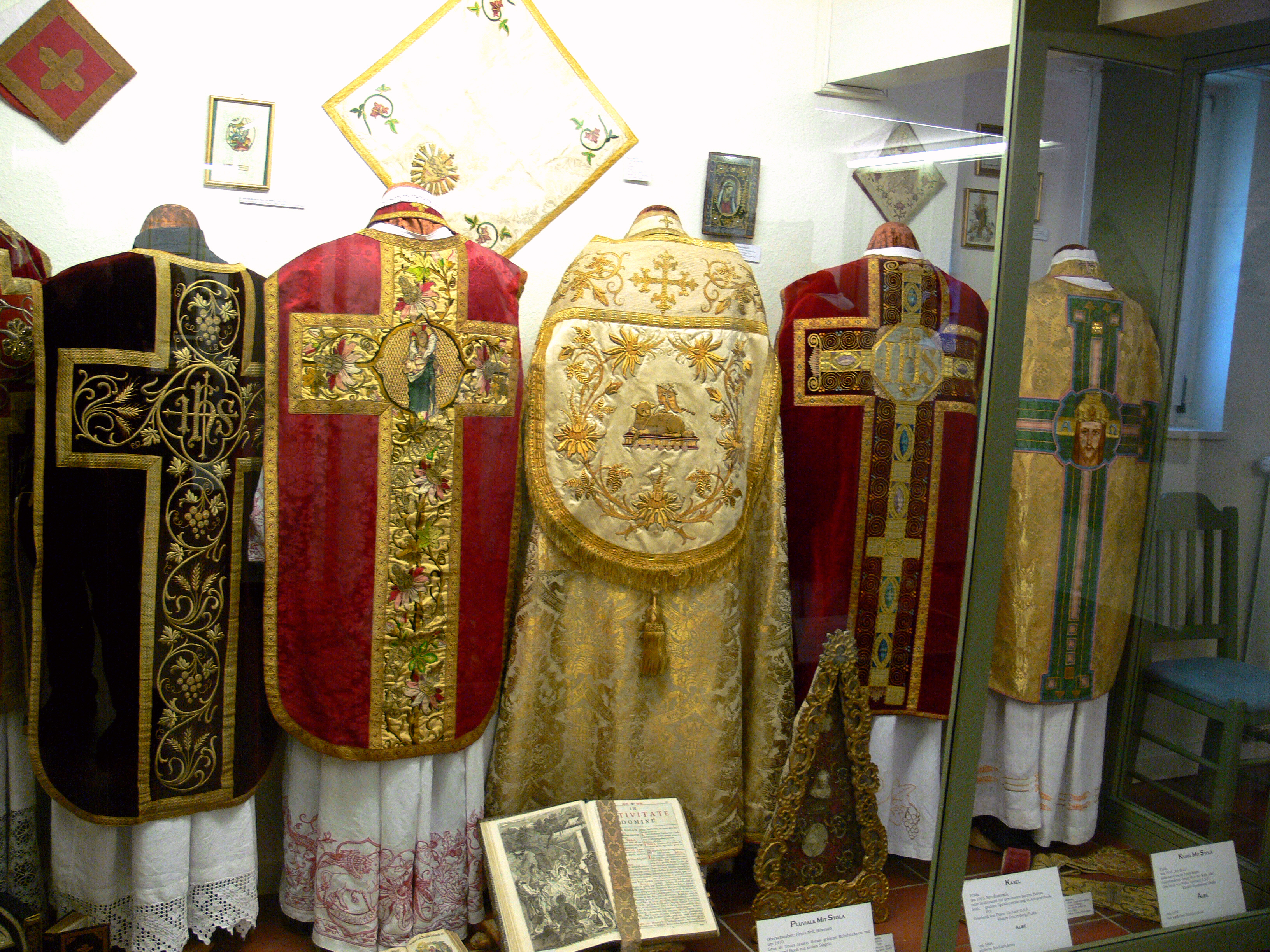 Weingarten, Museum für Klosterkultur Ausstellung von Meßgewändern